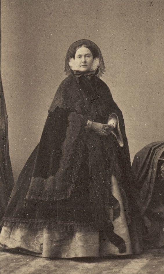 La principessa Matilde Bonaparte Demidova (1820-1904)